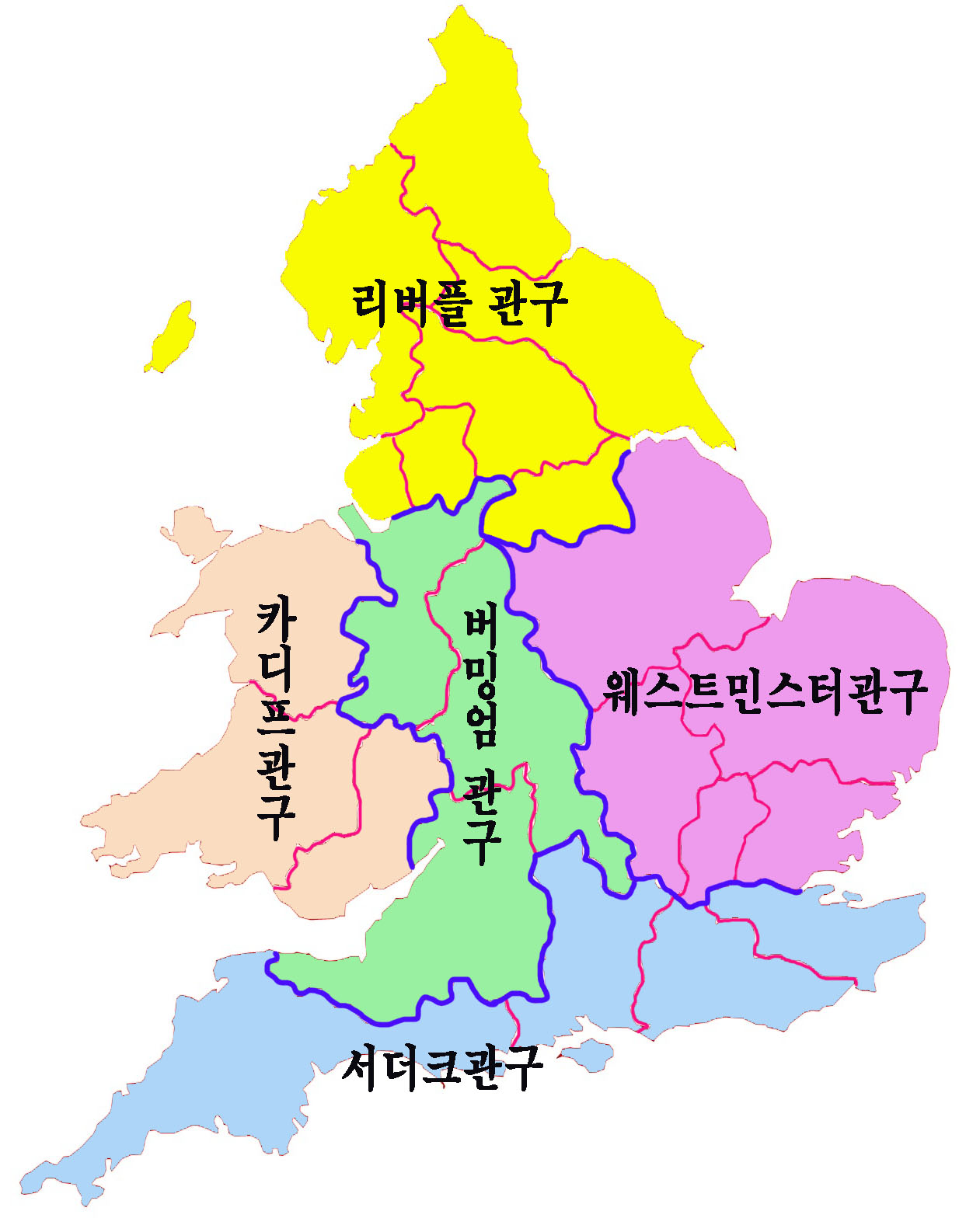 잉글랜드 및 웨일즈 가톨릭관구 구역도